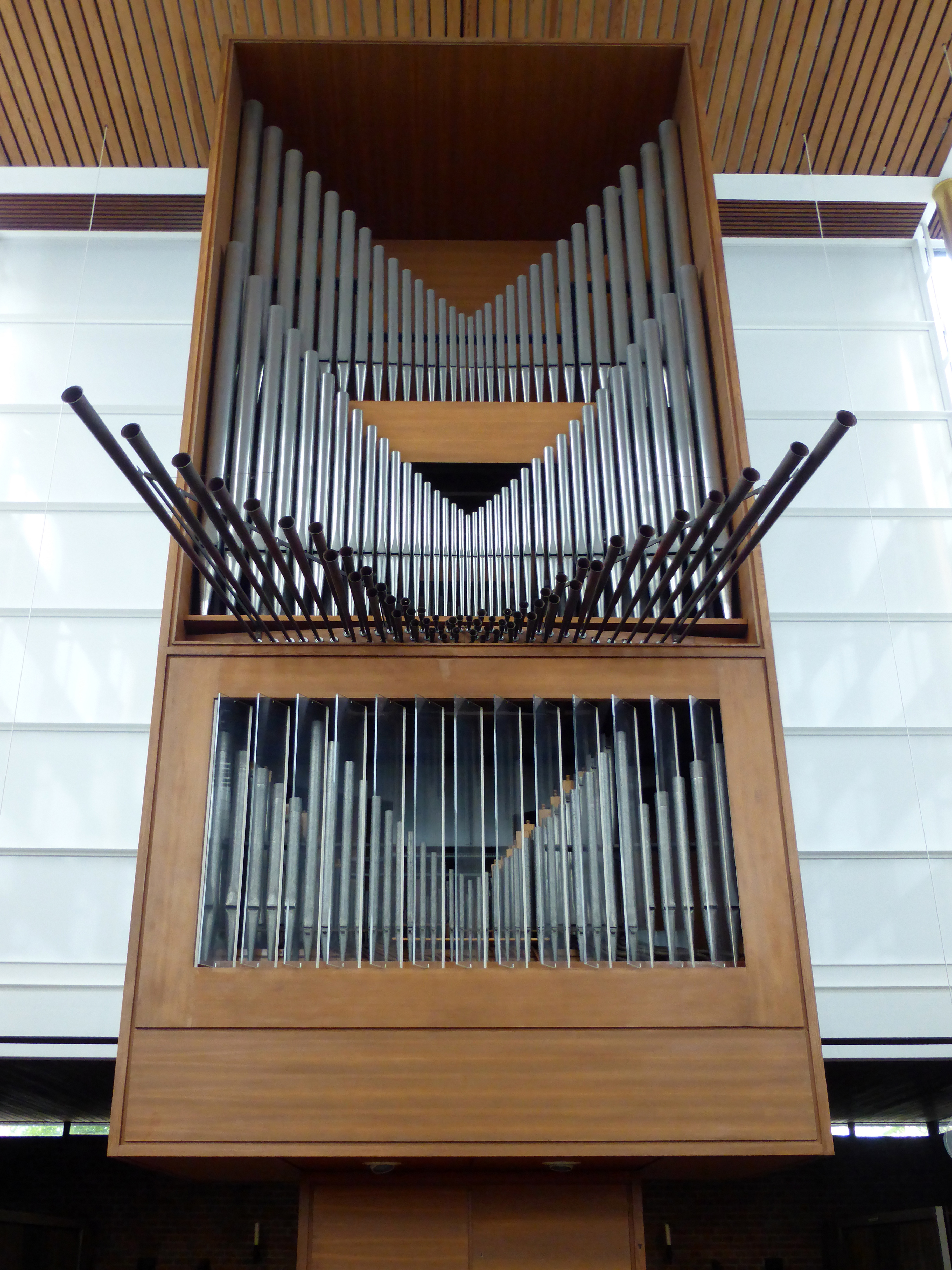 Johannes Klais Orgel, St. Stephan, Köln